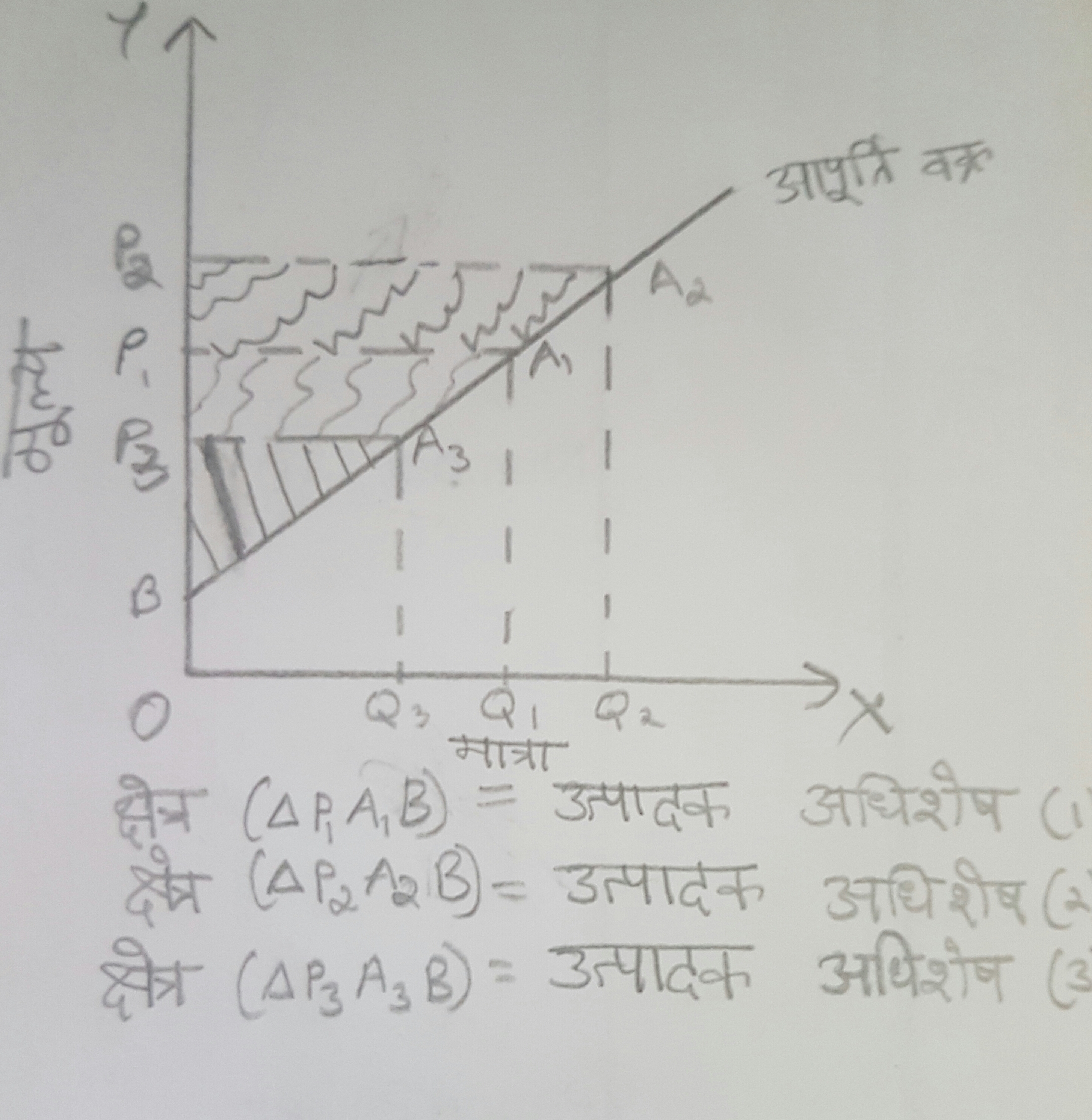 उत्पादक अधिशेष पर कीमत का प्रभाव का प्रतिनिधित्व